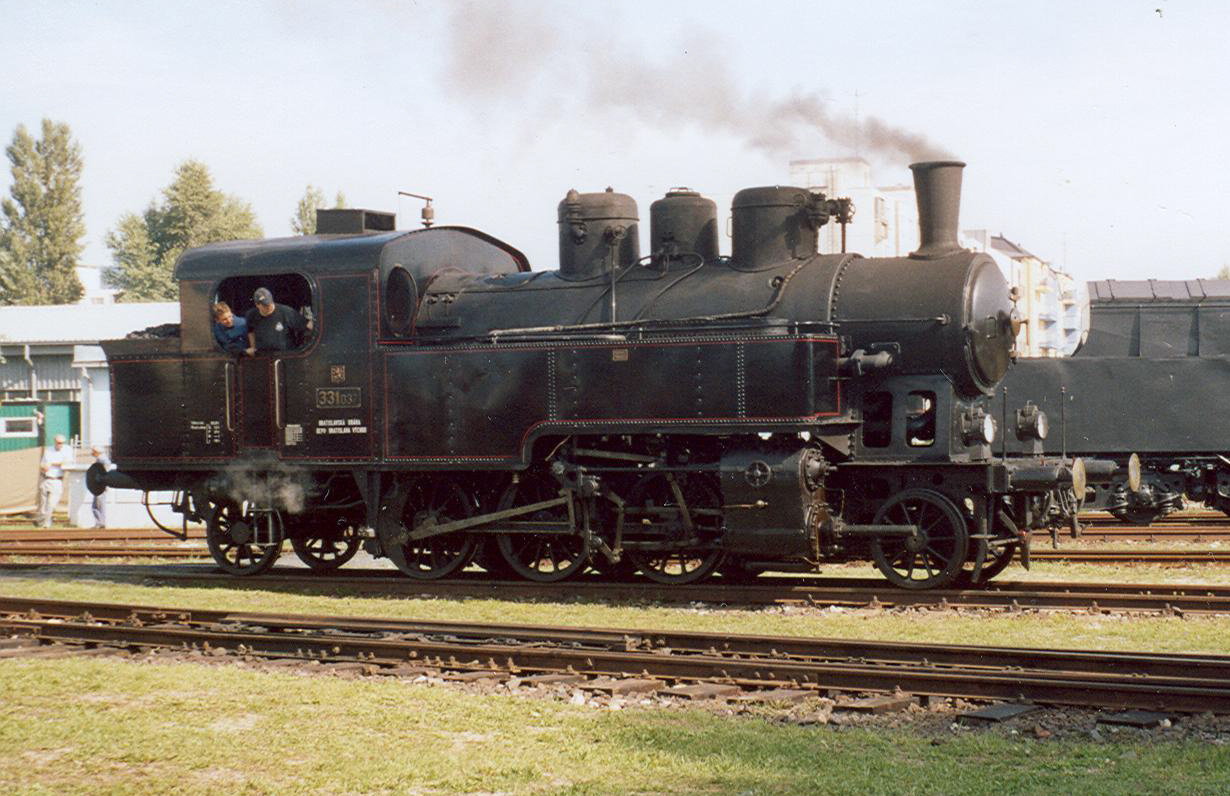 331.037 im Museumsdepot Bratislava Vychod